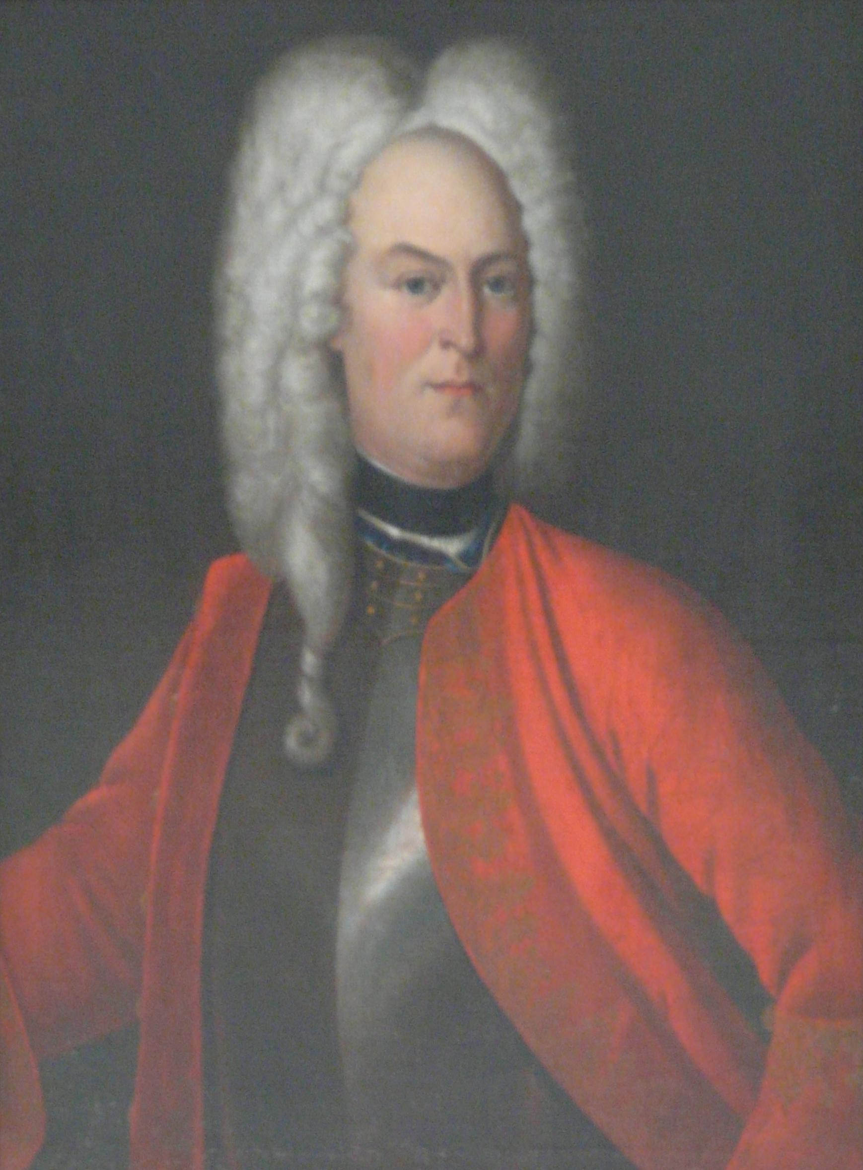 From the collection of the National Museum in Poznań. Portret mężczyzny z rodziny Ostrowskich, poł. XVIII w. Malarz działający w Wielkopolsce.